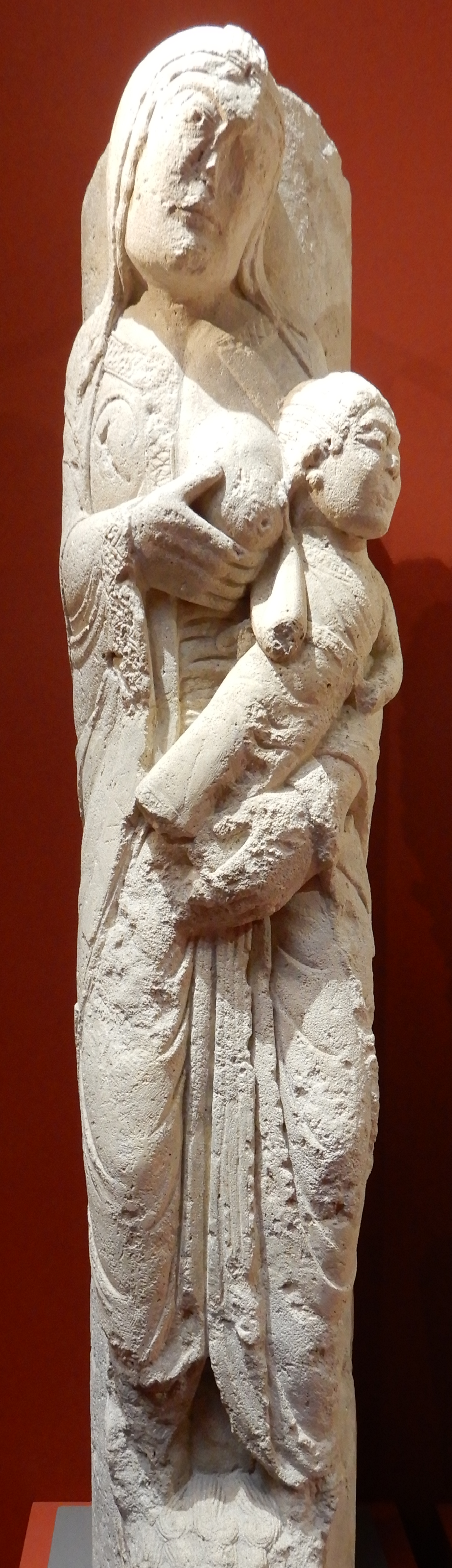 Statue-colonne de l'abbaye de Saint-Maur-des Fossés, vers 1135, en calcaire lutétien. Conservée au Musée de Saint-Maur et classée au titre des Monuments historiques. Saint Nicolas enfant se détourne du sein de sa mère pour respecter le jeûne.